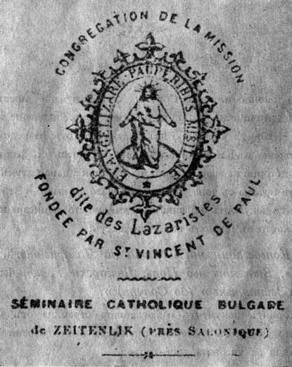 Бланка на документ на Солунската българска католическа гимназия.